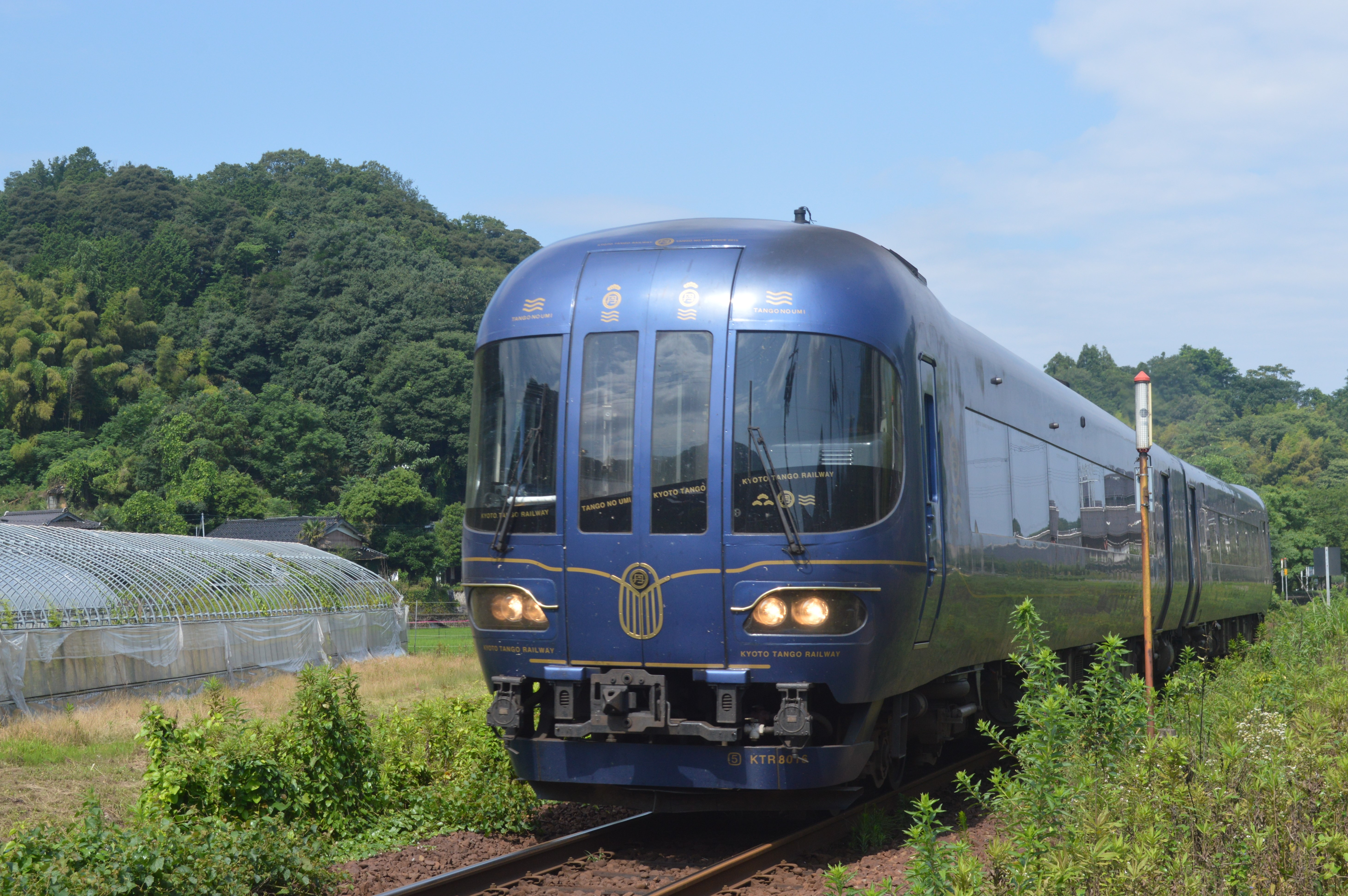 北近畿タンゴ鉄道KTR8000形気動車。京都丹後鉄道宮津線（宮豊線）夕日ヶ浦木津温泉駅の東側の下和田踏切で撮影。